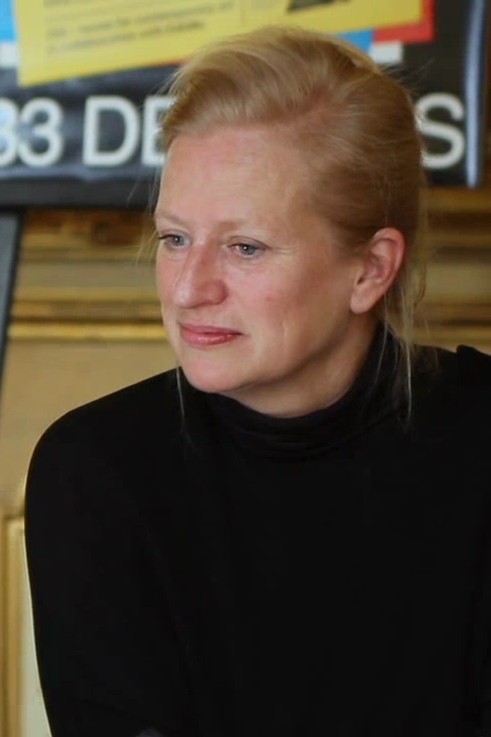 Aldo Bakker en Rianne Makkink (rechts) tijdens een interview met Jan Boelen.